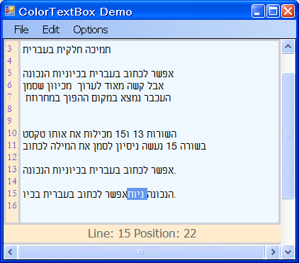 תמונת מסך. הדגמה של תמיכה בעברית חלקית בתוכנה. נוצר על ידי משתמש:Effib